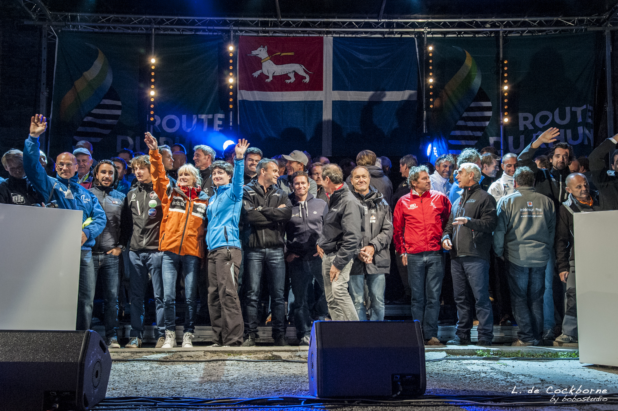 route_du_rhum_2014-254